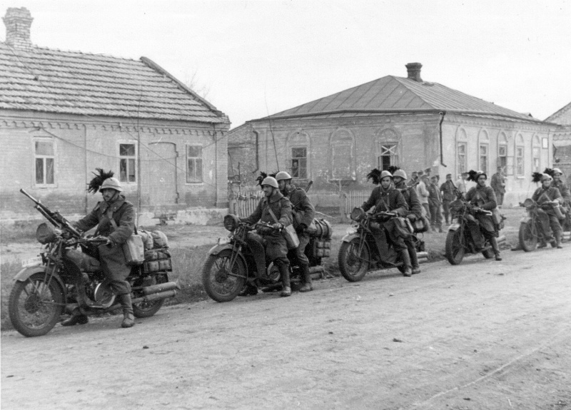 Итальянские мотоциклисты-берсальеры в пригороде Сталино